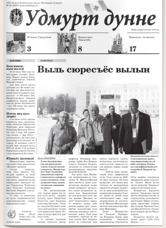 Удмурт: Так выглядит обложка газеты "Удмурт дунне"